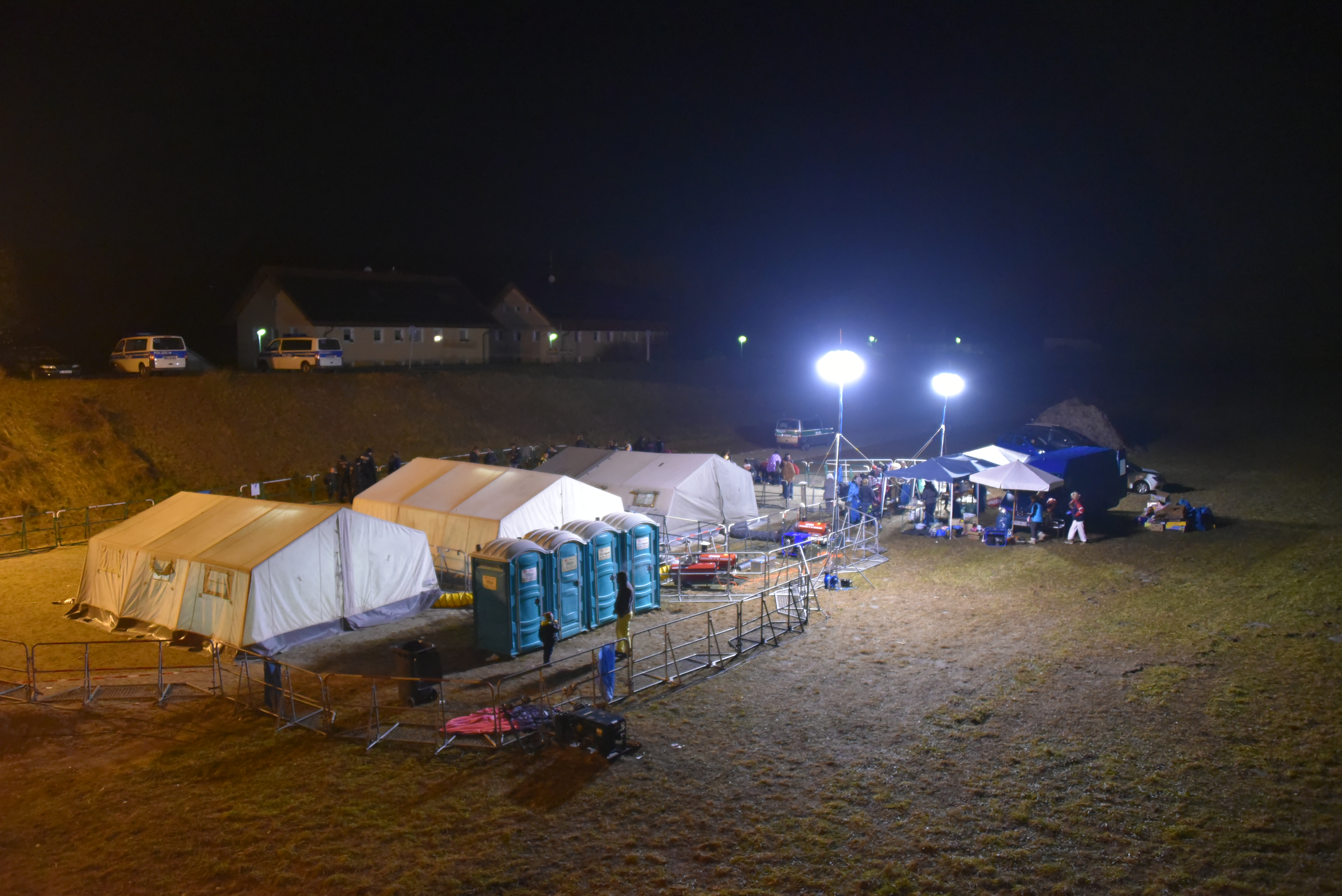 Flüchtlingsunterkunft Simbach am Inn